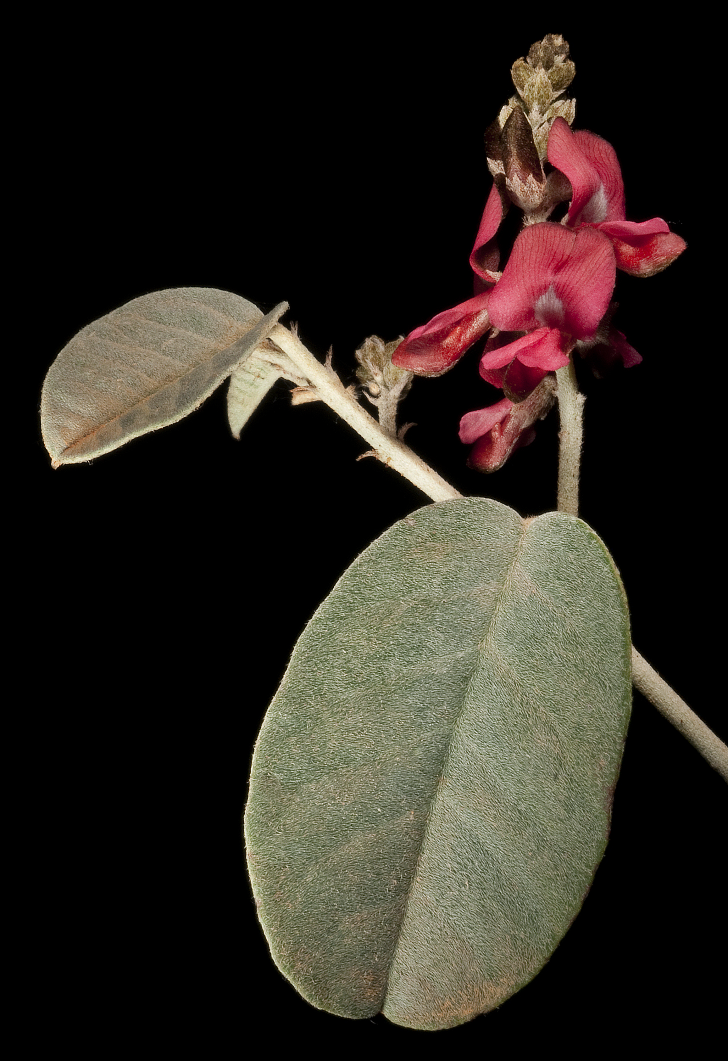 KRT4559